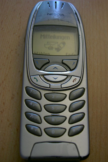 Nokia 6310, Handy